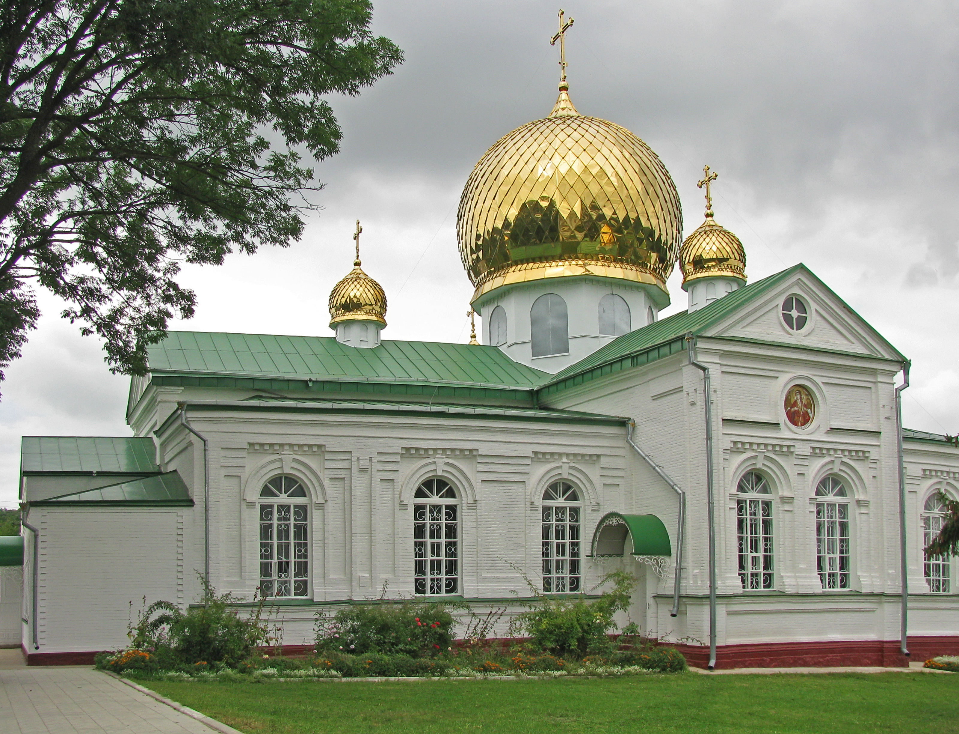 Церква Св. Миколи (зміш.), с. Лебедин